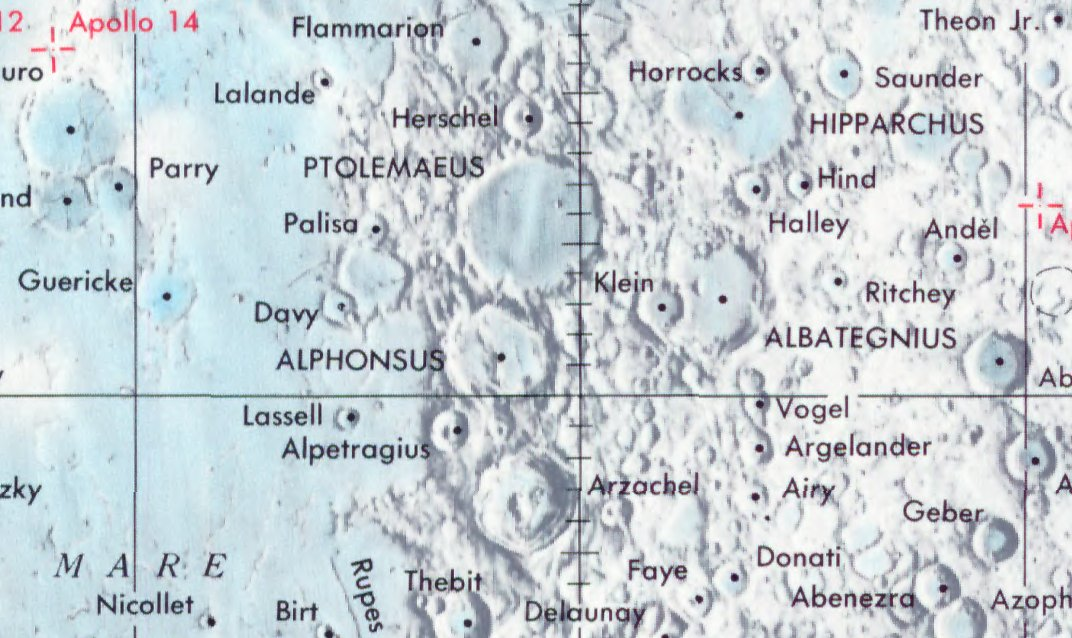 Cráter lunar Alphonsus. Localización. (Lunar Chart LPC1. Second Edition)